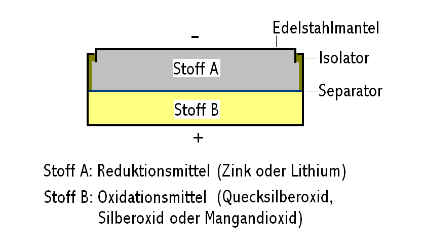 Schema einer Knopfzelle